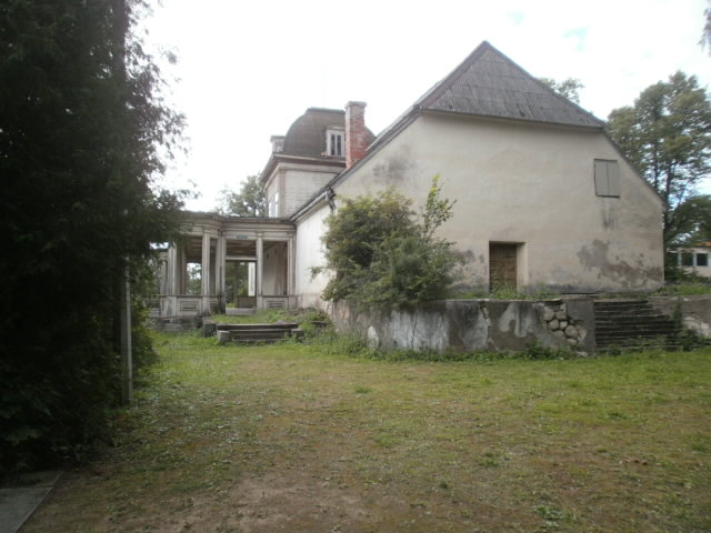 Asti mõisa hoone linnuse kunagisel lõuna - edelaküljel.